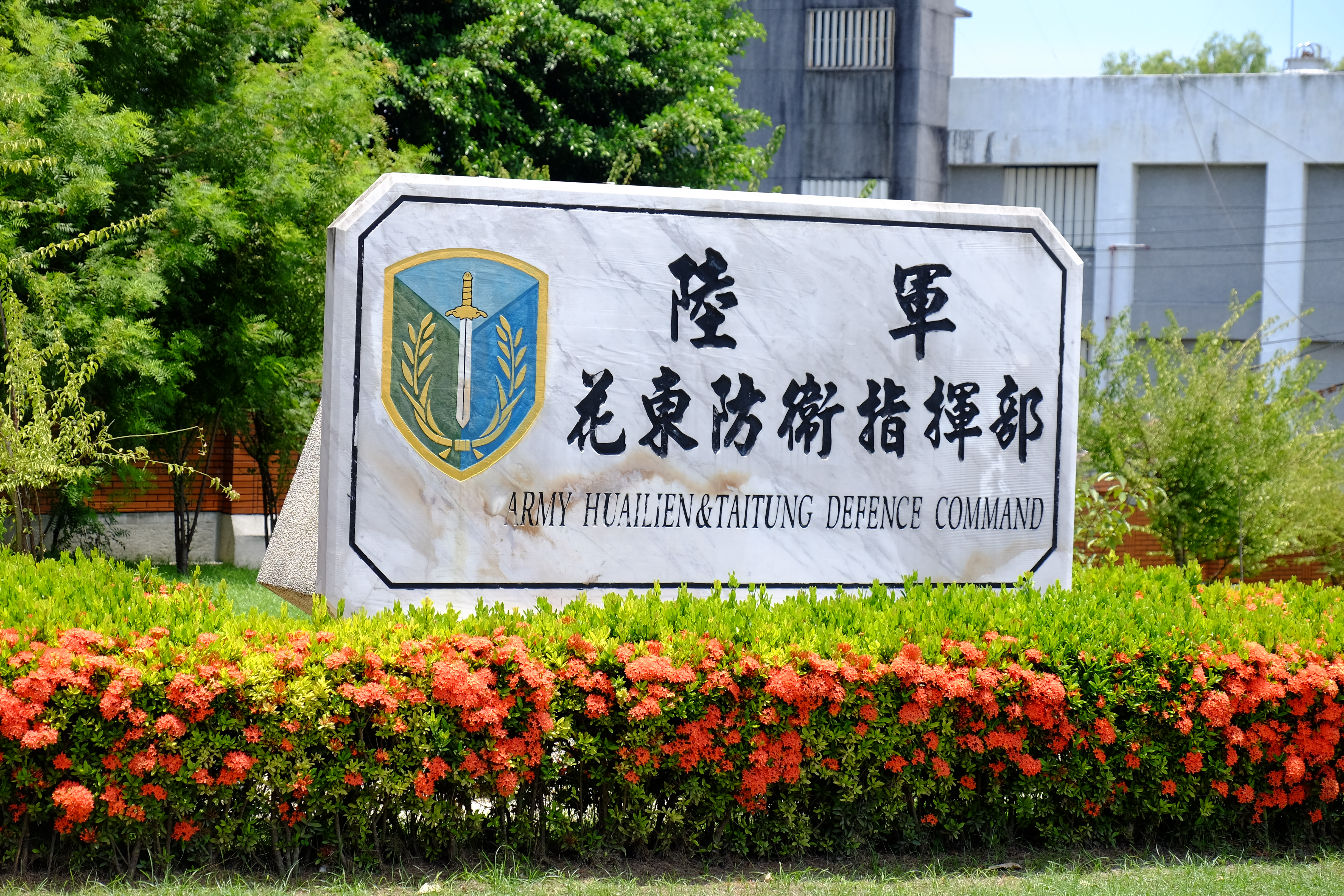 陸軍花東防衛指揮部正門旁的招牌。